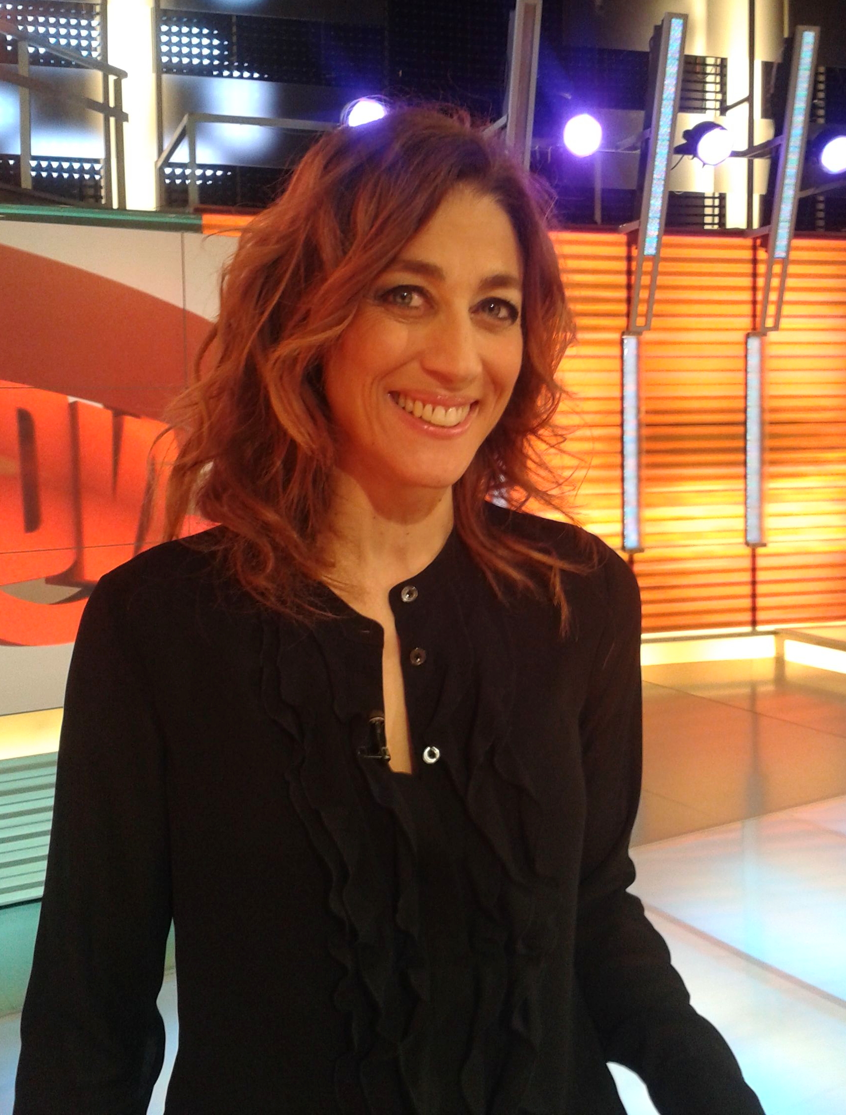 Helena Garcia Melero al plató del programa "Divendres"